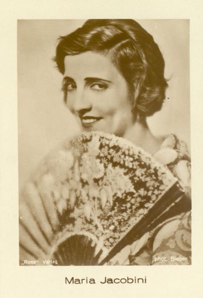 Foto dell'attrice Maria Jacobini